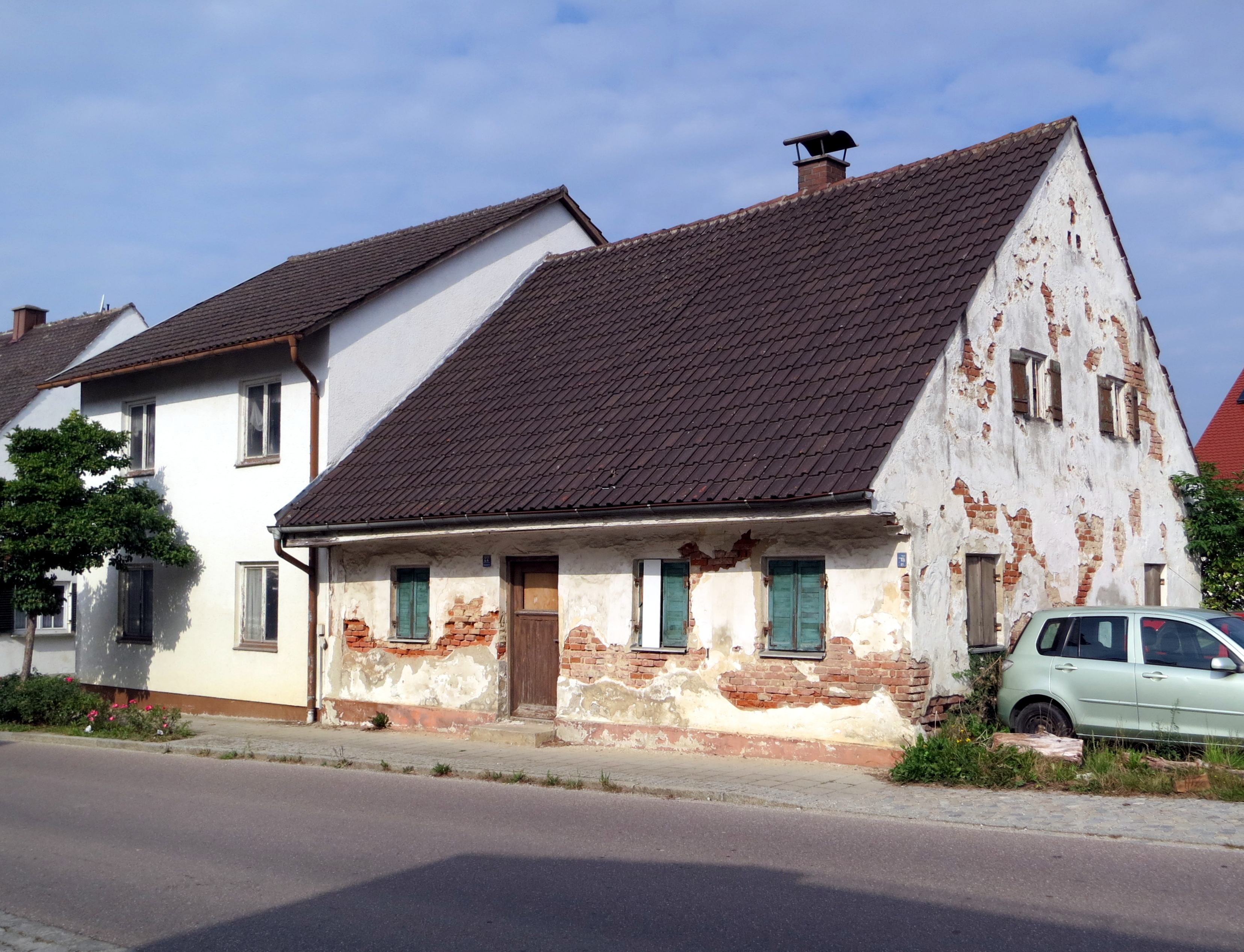 Pipinsrieder Straße 27 in der Gemeinde Altomünster, Übersicht, aus Ost